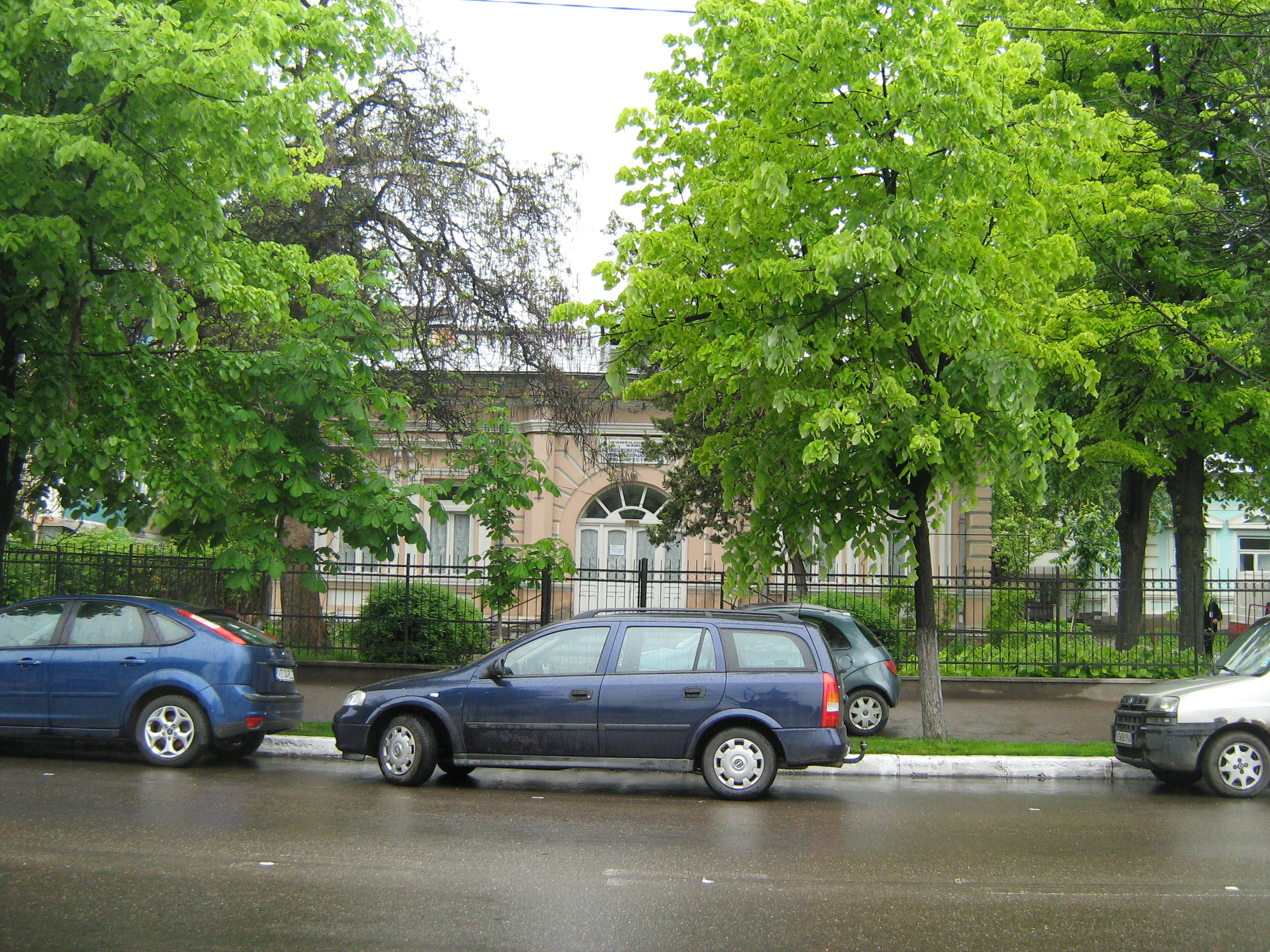 Spitalul Municipal de Urgență, Secția "Boli infecțioase" (Pavilion I-II)